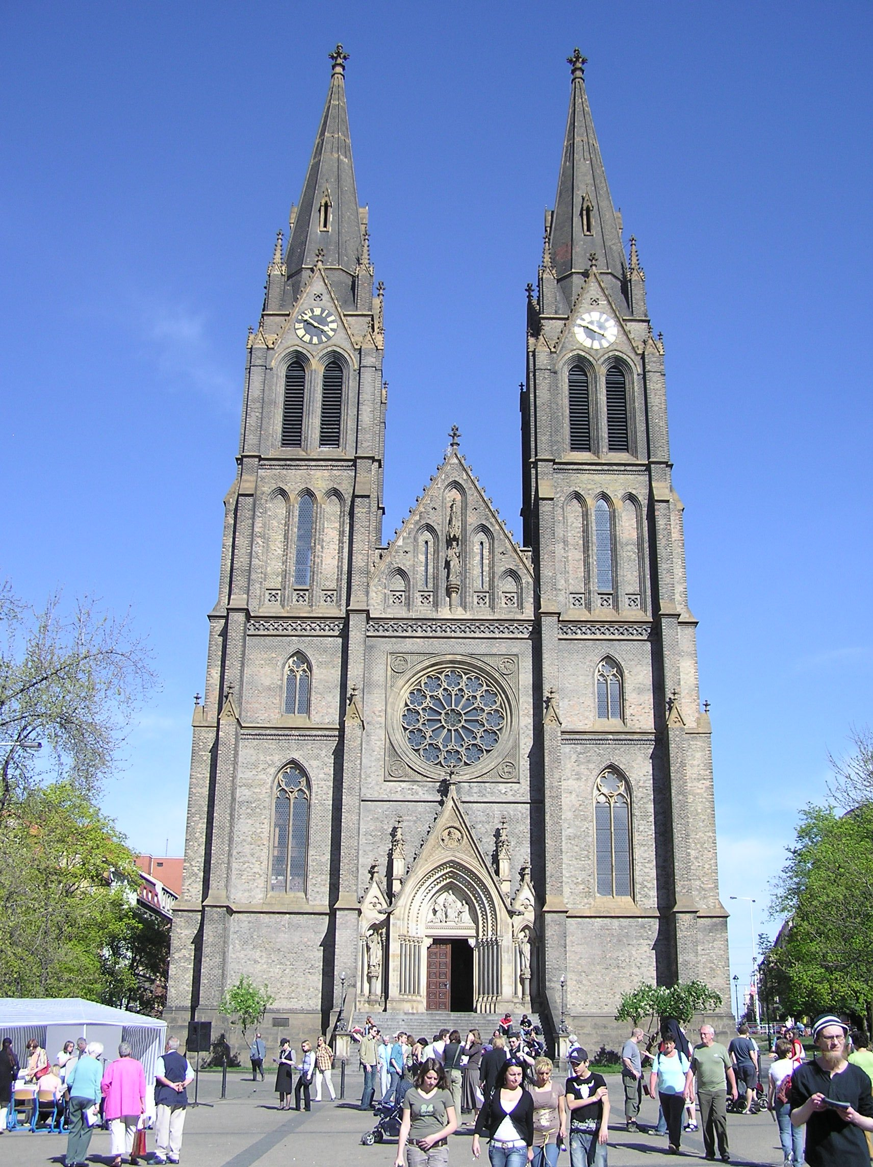 Temple of Saint Ludmila on Náměstí Míru, Prague, 2007-04-15.